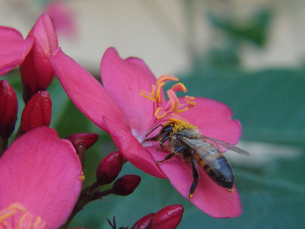 Bee seeking Jatropha integerrima nectar gets pollen in her hair!